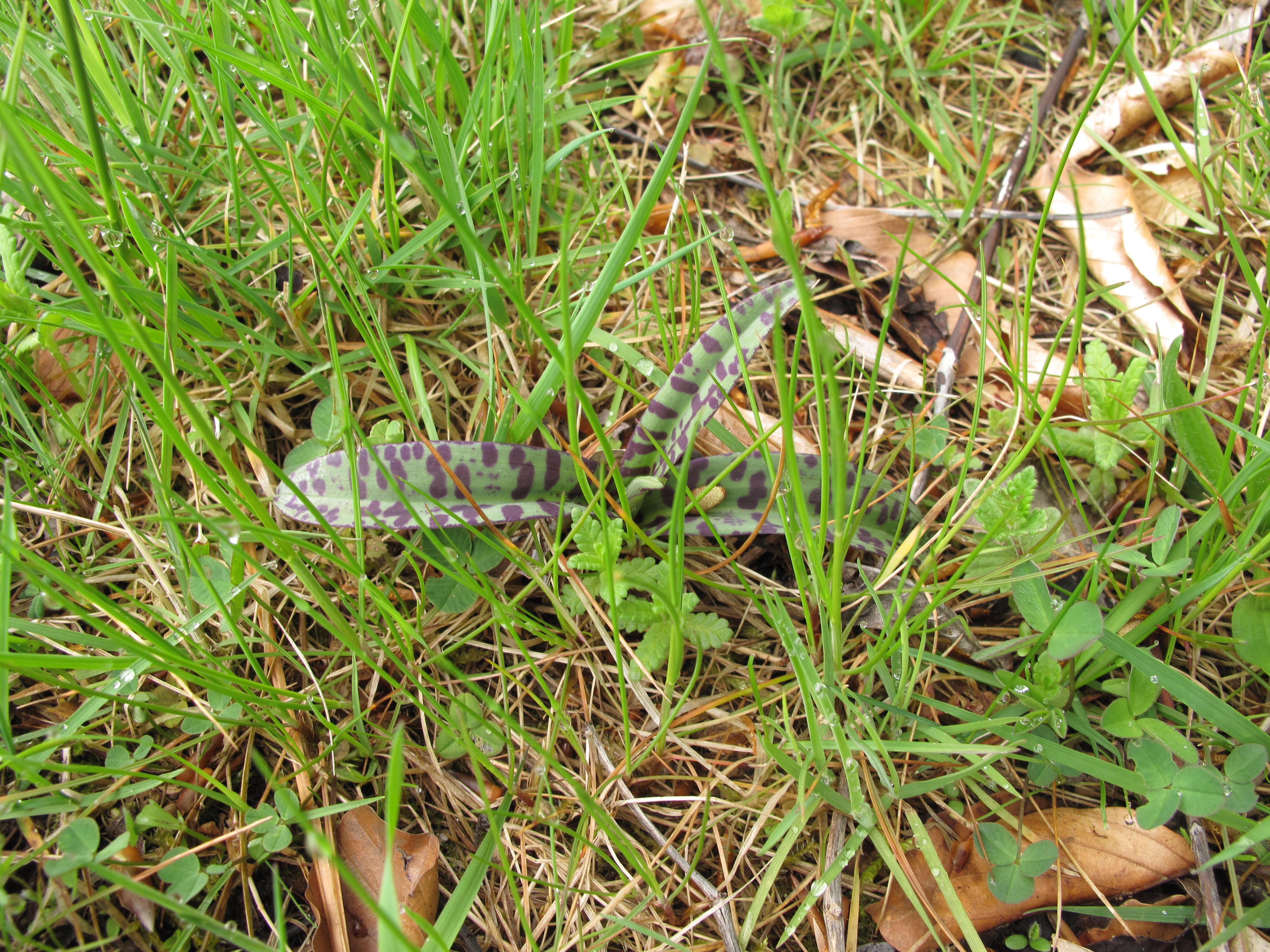 Prstnatec Fuchsův pravý (Dactylorhiza fuchsii subsp. fuchsii) rostlina v přírodní rezervaci Horní luka. Okres Český Krumlov, Česká republika.